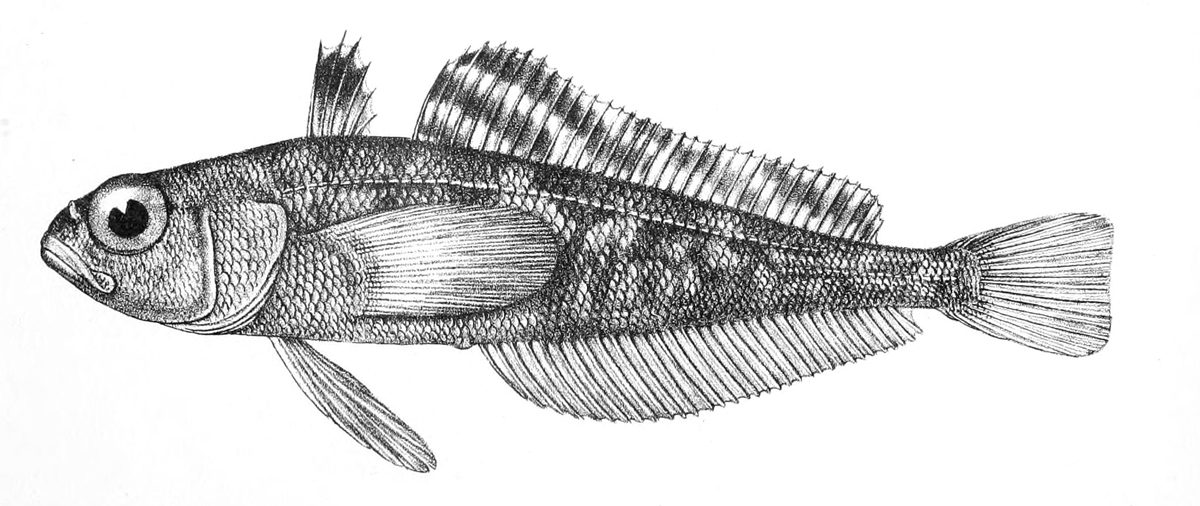 Trematomus eulepidotus = Pseudotrematomus eulepidotus